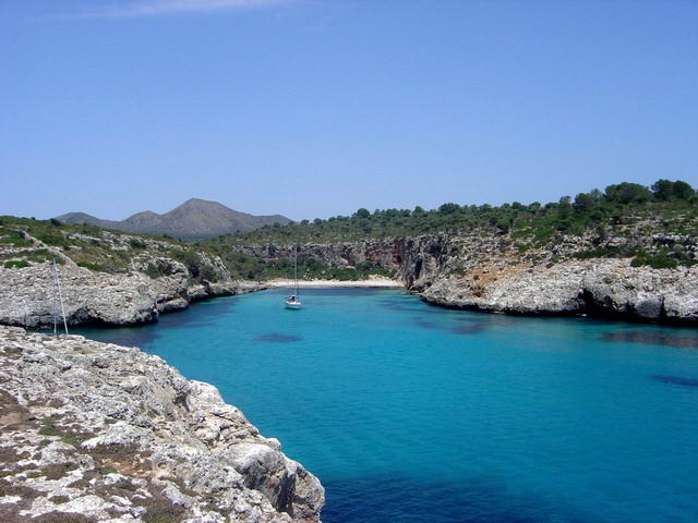 Cala Magraner. Mallorca.